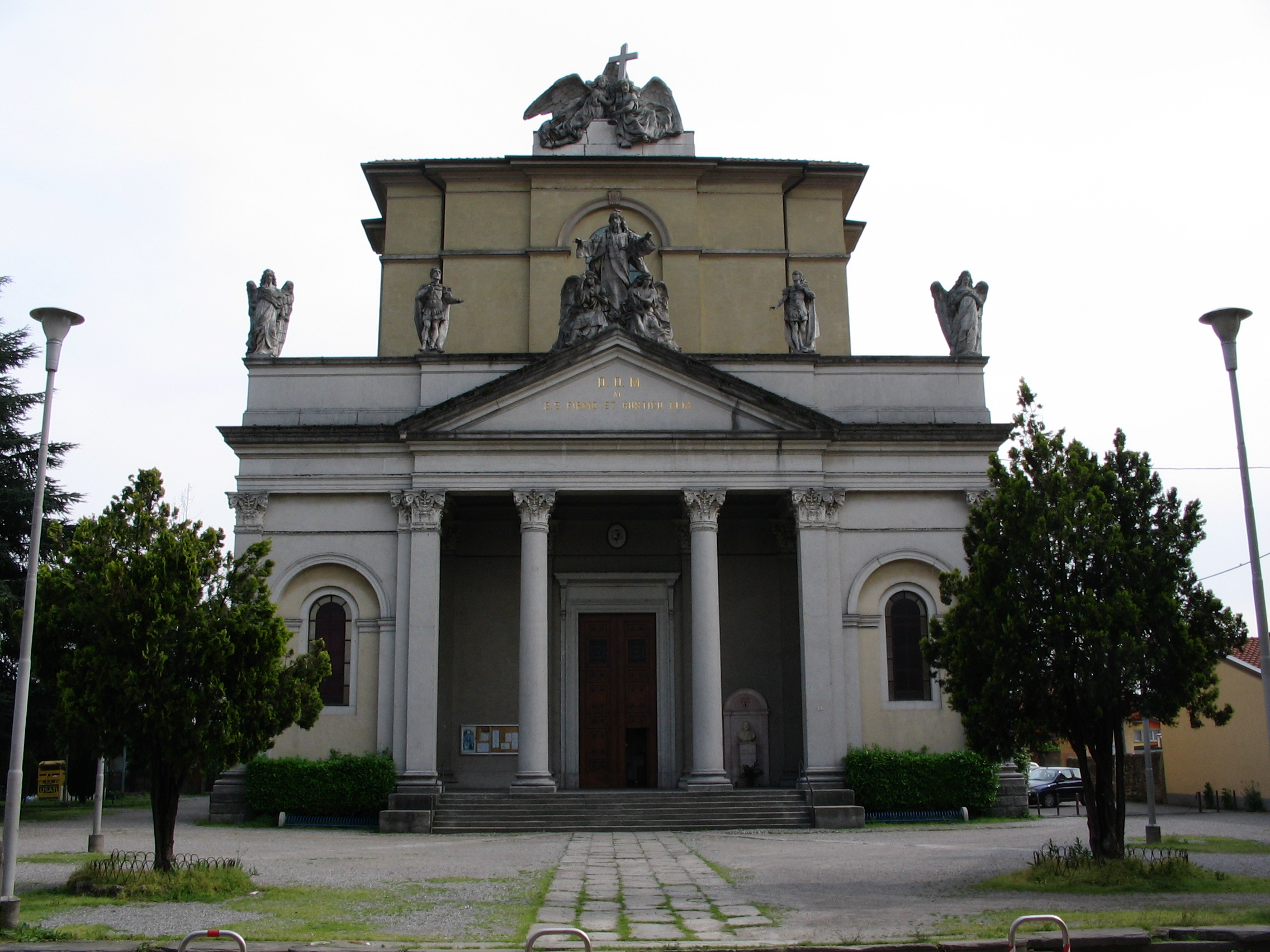 Autore Giorces. Presezzo, San Fermo e Rustico..